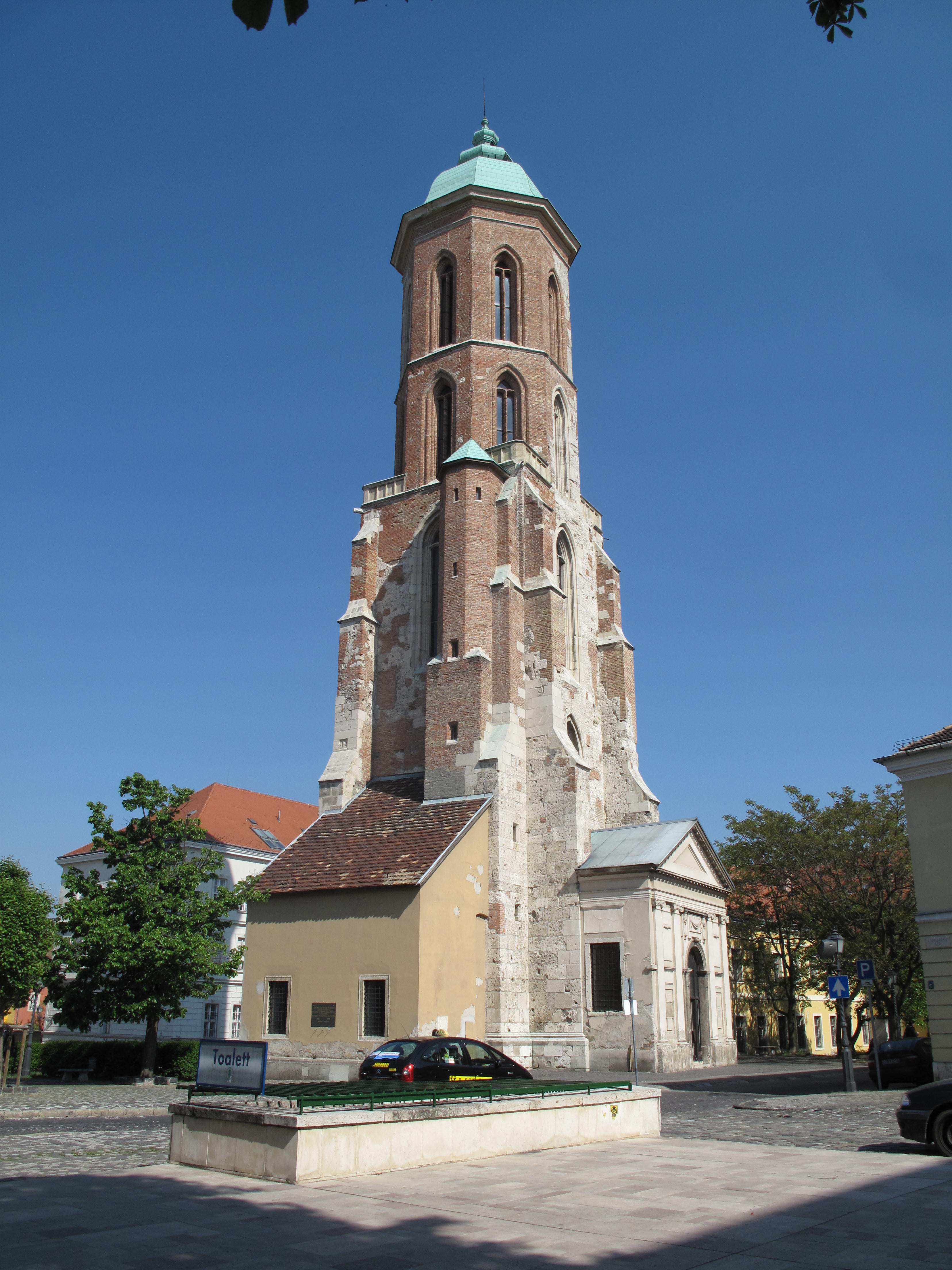 Budapešť